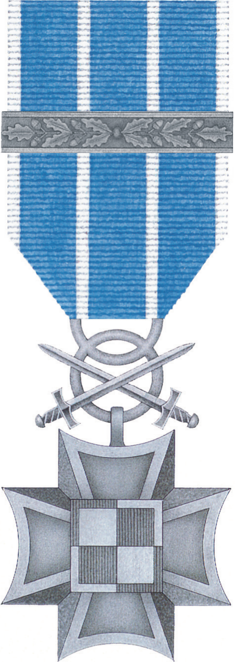 Lotniczy Krzyż Zasługi z Mieczami. Awers.